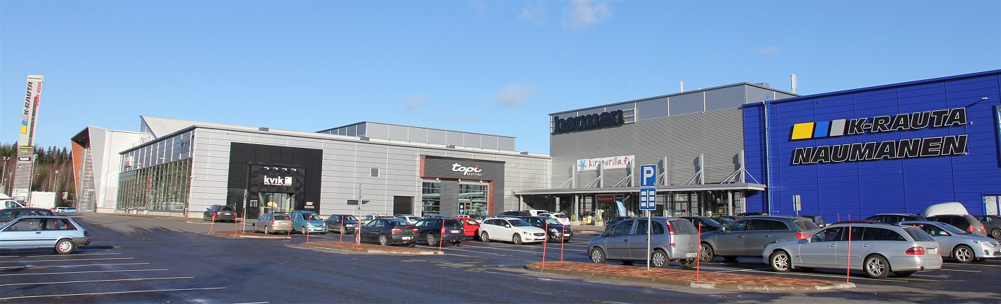 Kauppapaikka Herman on vuonna 2012 valmistunut kauppakeskus Kuopiossa Leväsen kaupunginosassa. Katuosoite on Leväsentie 2.